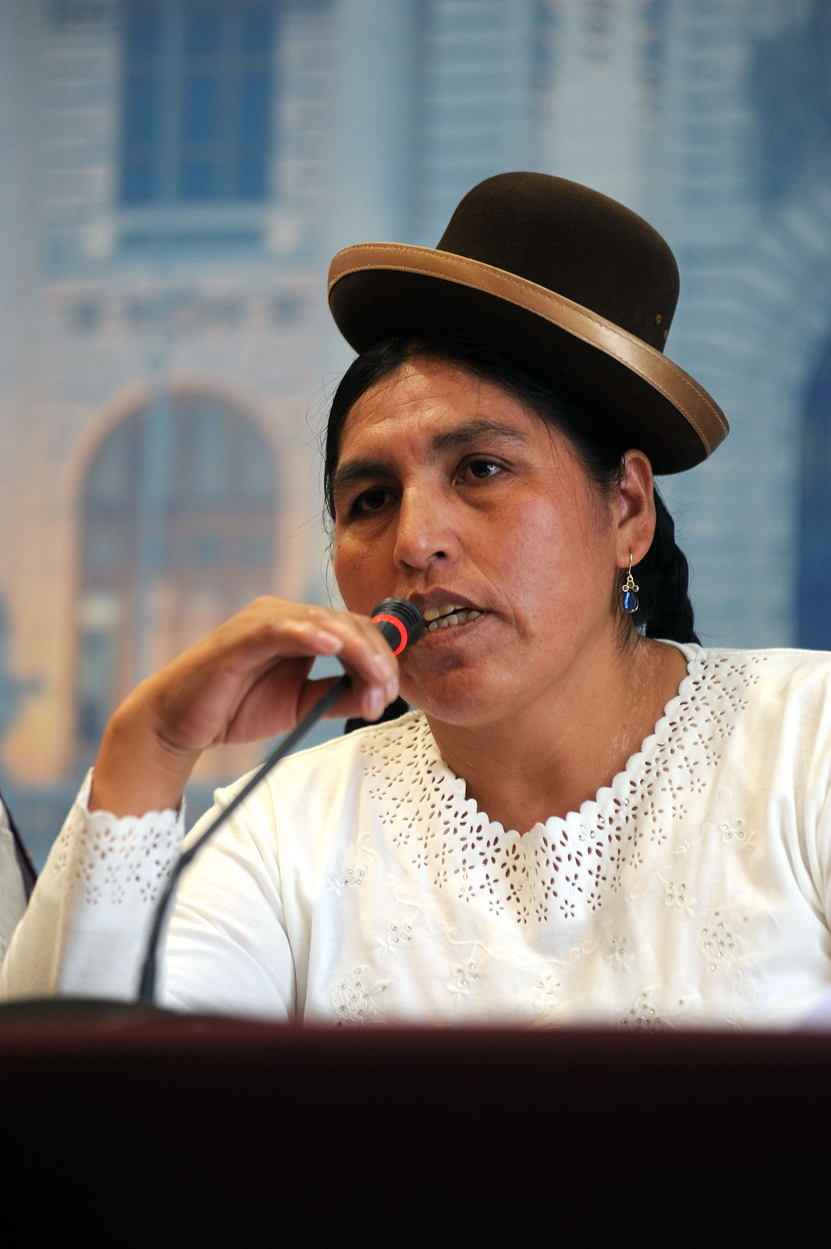 En conferencia de prensa y con presencia de dirigentes de la Confederación Campesina del Perú, la congresista Claudia Coari Mamani se refiere a aspectos relacionados con la próxima reglamentación de la Ley de Consulta Previa, disposición legal aprobada anteriormente por el Parlamento Nacional.